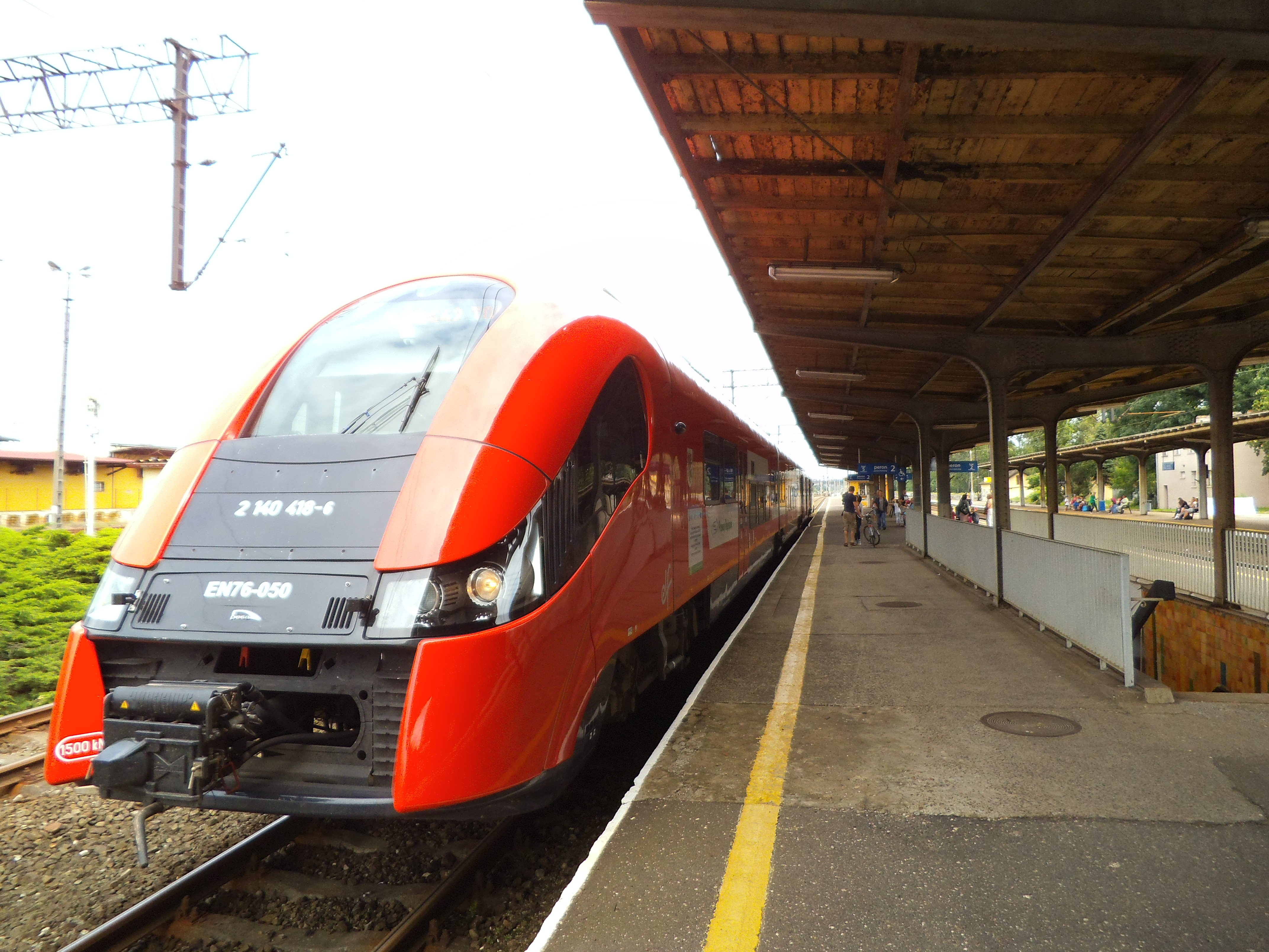 Toruń Wschodni2